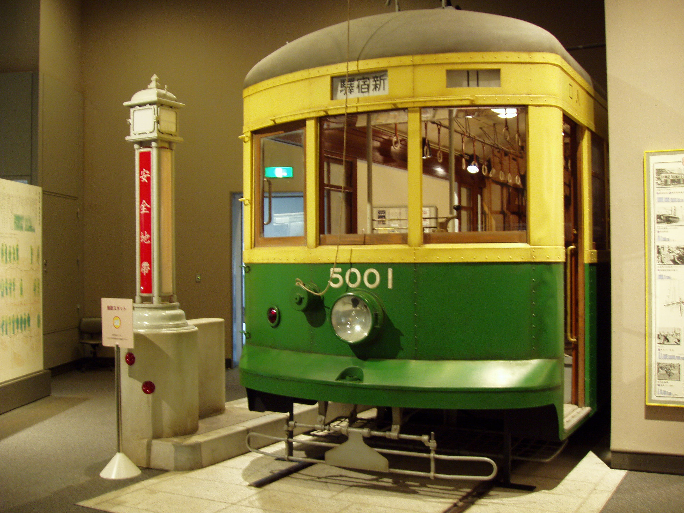 新宿歴史博物館